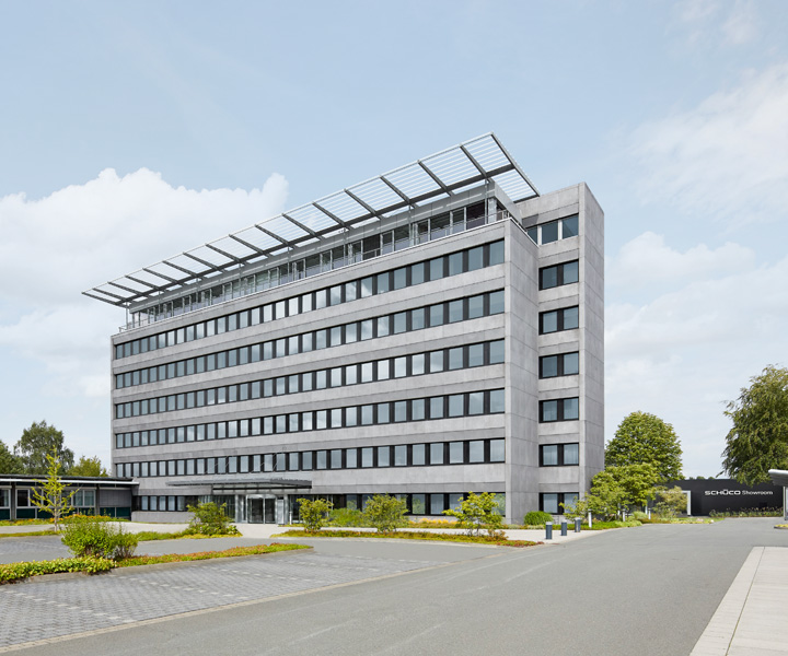 Unternehmenszentrale Bielefeld